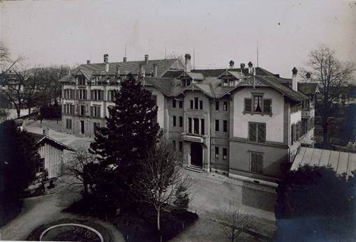 Evangelisches Seminar Muristalden (Bern, Schweiz), Seminarbau mit Musterschule (rechts)